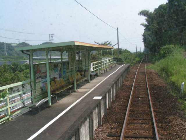 天竜浜名湖鉄道 原田駅